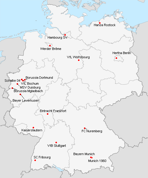 Répartition des clubs en 1.Bundesliga 1998-1999.